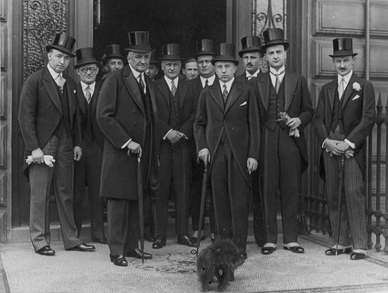 Delegacja polska przed budynkiem Ambasady RP w Londynie. Stoją od lewej: radca Jan Żółtowski, radca handlowy Ambasady RP w Londynie Tadeusz Geppert, dyrektor Departamentu Obrotu Pieniężnego Ministerstwa Skarbu Włodzimierz Baczyński (w głębi), ambasador RP w Londynie Konstanty Skirmunt, wiceminister przemysłu i handlu Henryk Floyar-Rajchman (w głębi), dyrektor Departamentu Handlu w Ministerstwie Przemysłu i Handlu Mieczysław Sokołowski, sekretarz ambasady w Londynie Józef Zarański (w głębi), radca ekonomiczny w MSZ Antoni Roman, wiceminister skarbu Adam Koc, radca w Ministerstwie Skarbu Wacław Mohl, dyrektor Departamentu Ekonomicznego w Ministerstwie Rolnictwa Adam Rose, radca Ambasady RP w Londynie Leon Orłowski.